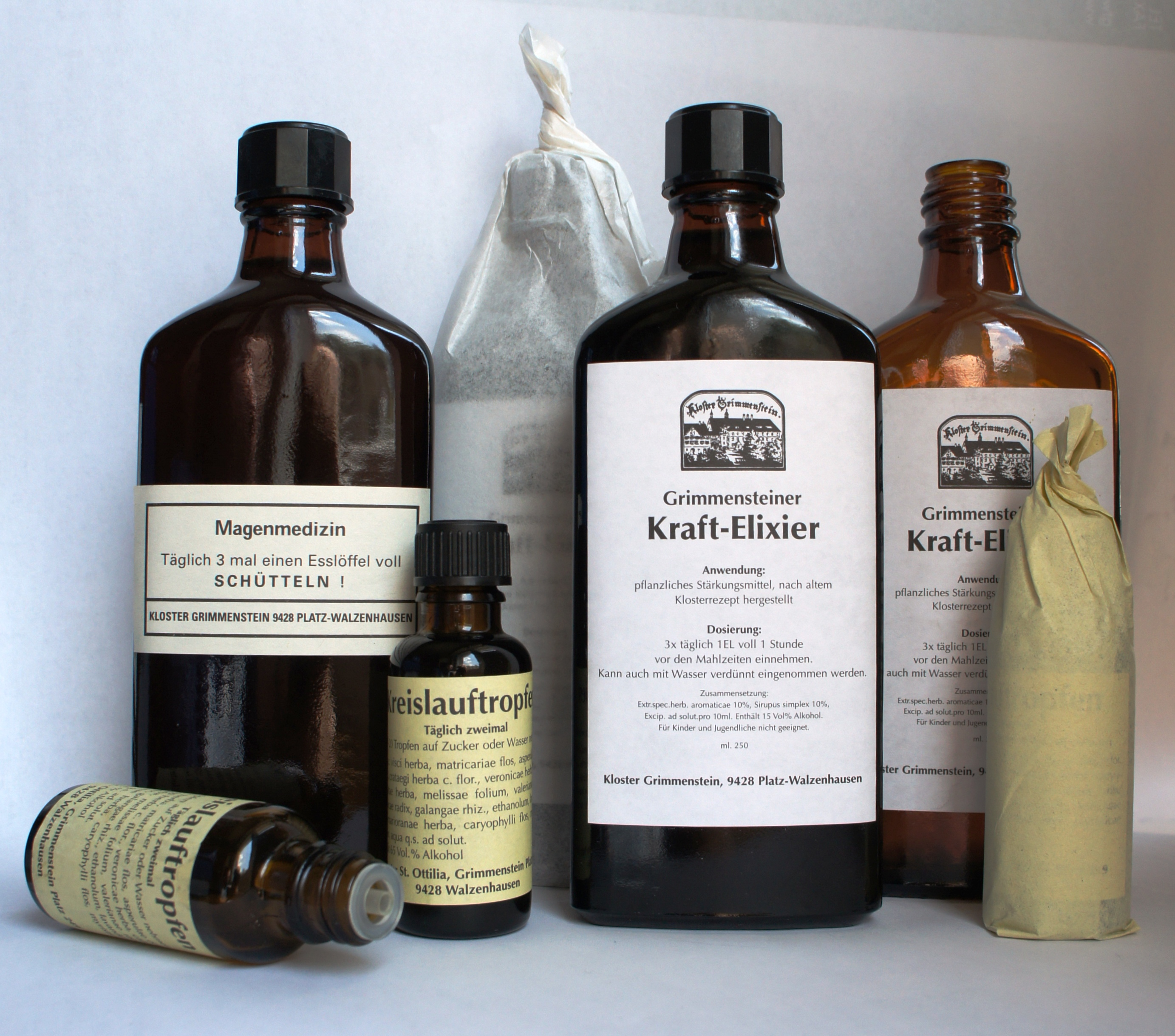 Magenmedizin, Kreislauftropfen und Kraftelixir (volle und leere Flaschen) aus der Klosterapotheke des Klosters Grimmenstein.